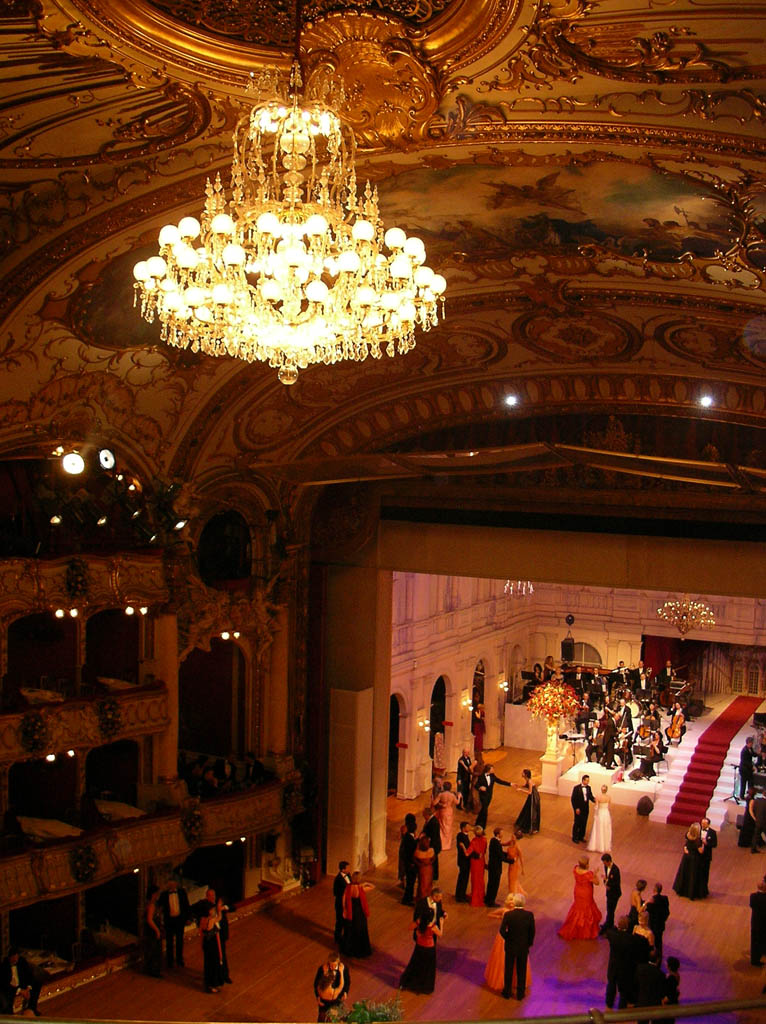 Opera Ball in Graz, Austria. Unbestuhltes Parkett und Bühne als repräsentativer Ballsaal.